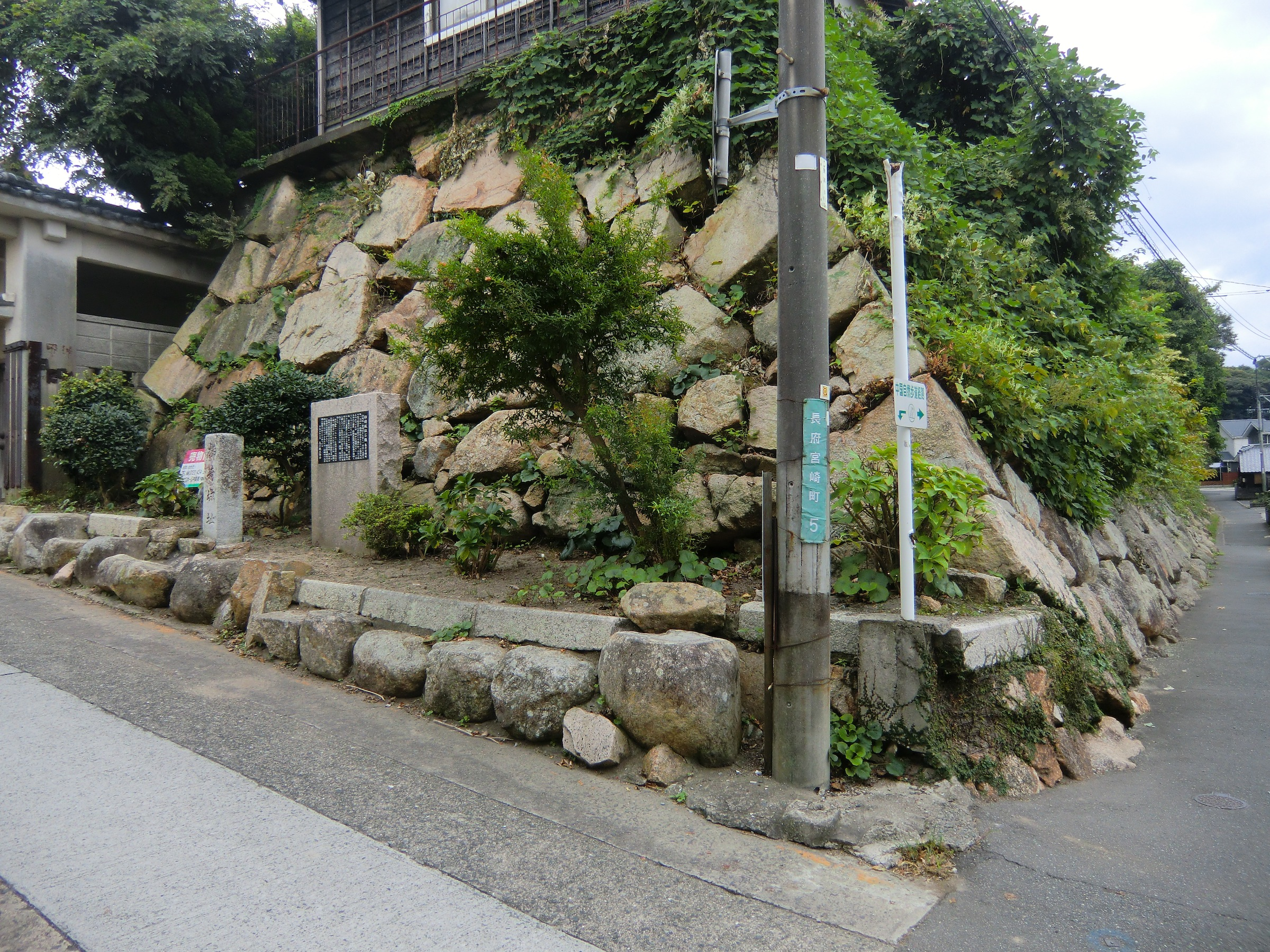 長門国櫛崎城跡の現存石垣（下関市）